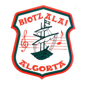 Escudo del Biotz Alai